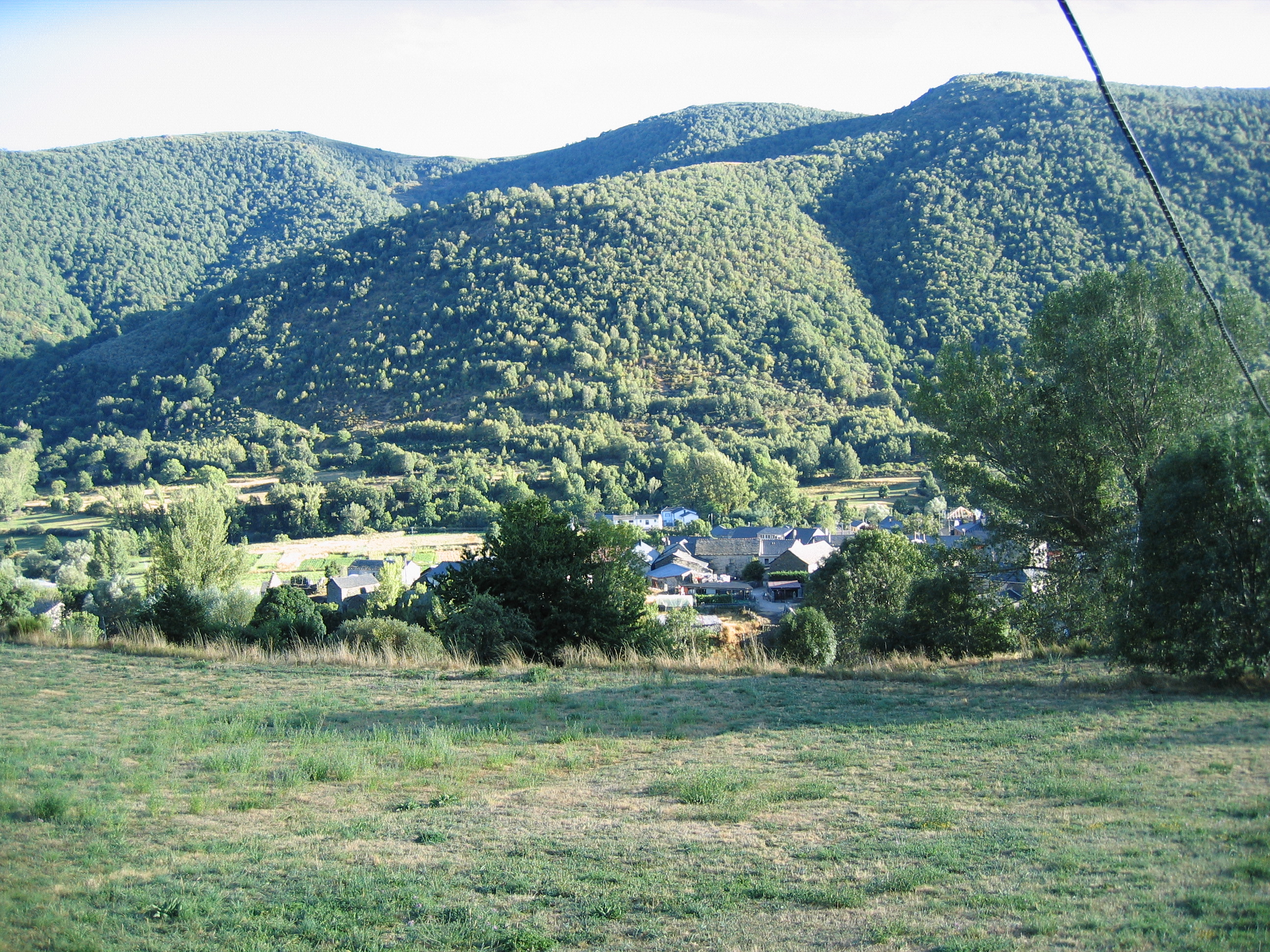 Vista del pueblo de Murias de Paredes